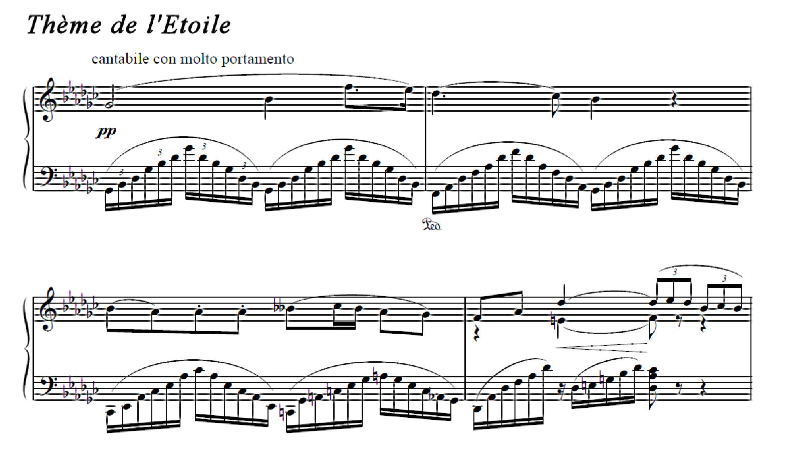 Thème de l'Etoile extrait de l'Etoile du Nord de Meyerbeer